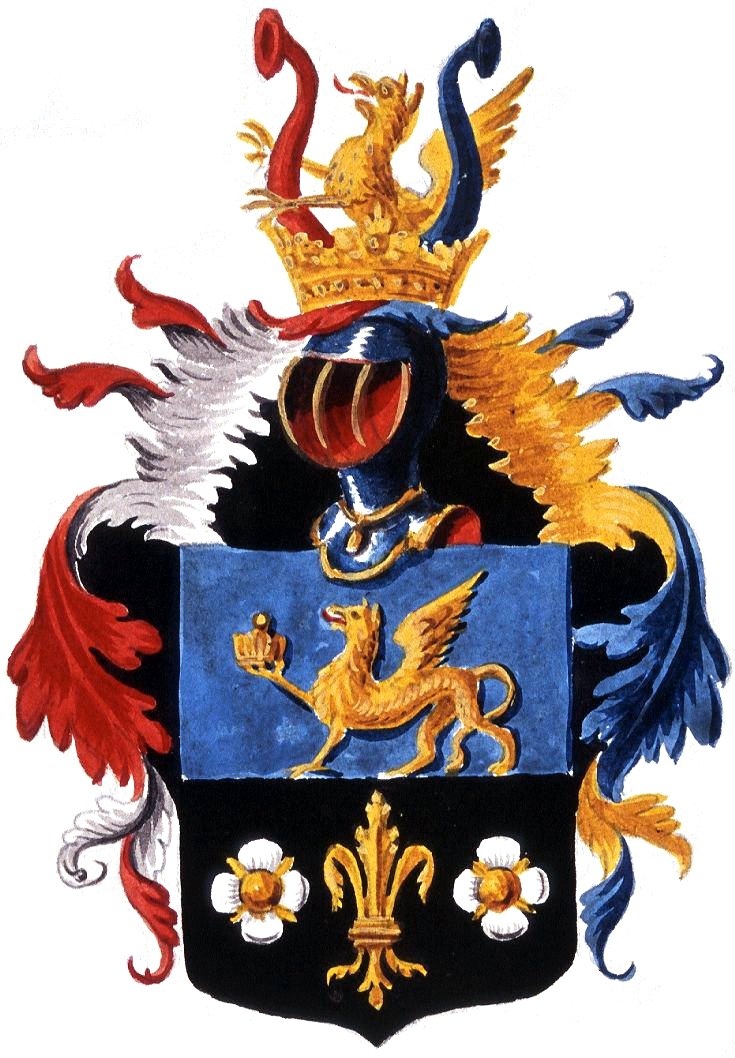 Armoiries, 1557, famille von Bellawary von Sykawa / Burchard Bélavary de Sycava